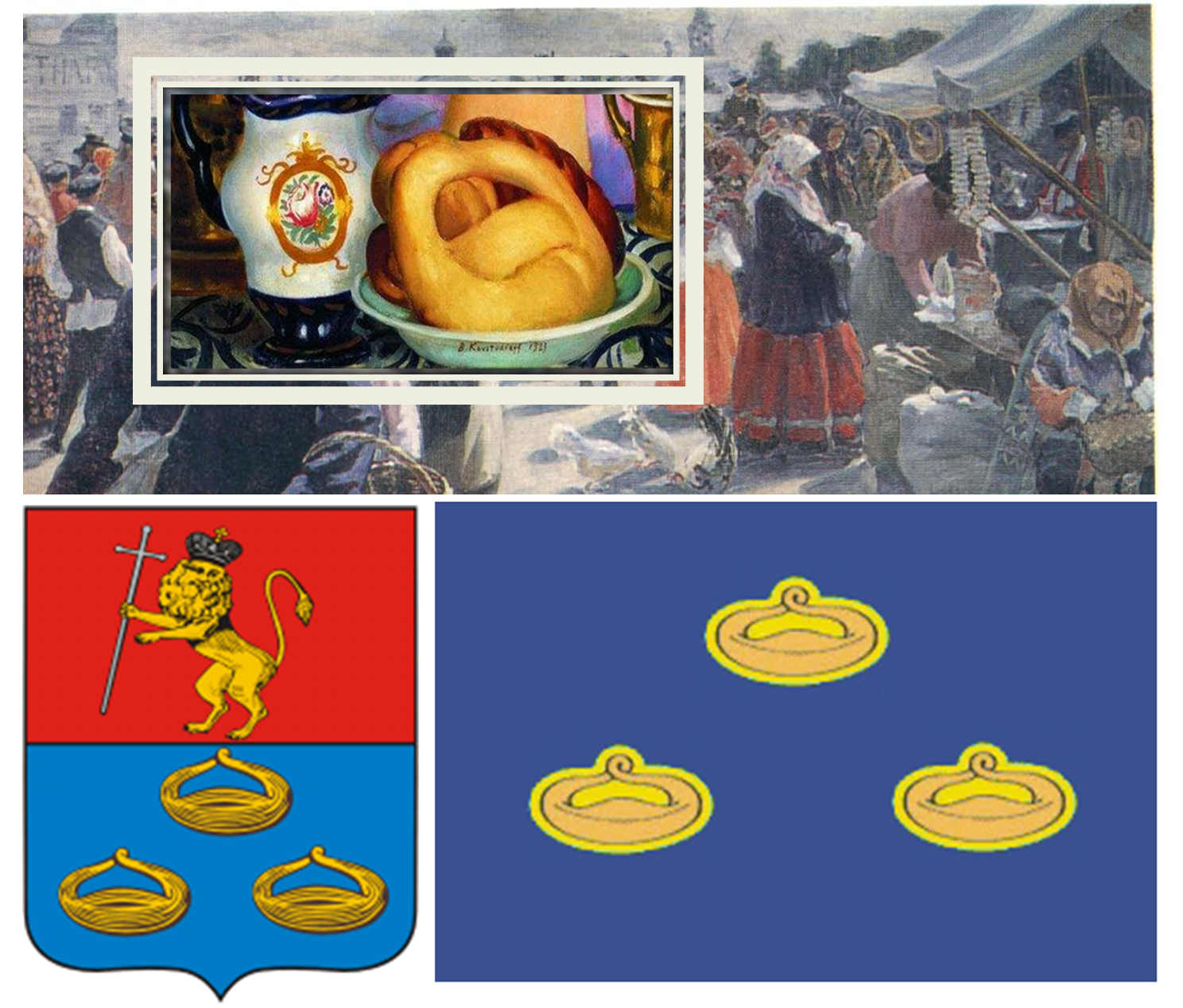 Kołacz muromski